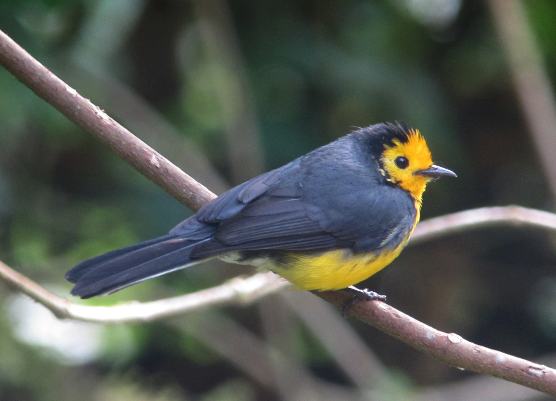 Manizales, Caldas, Colombia